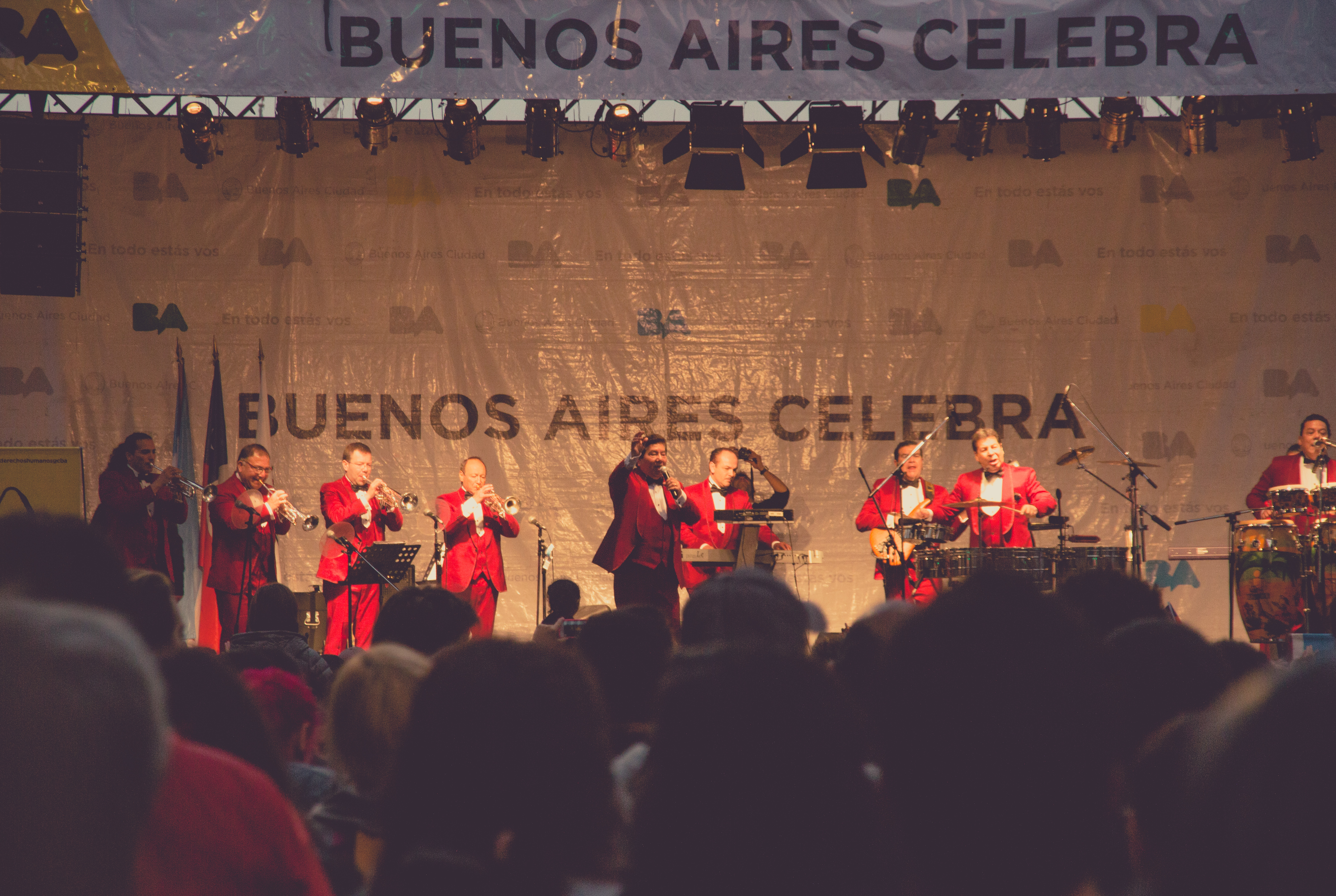 En Buenos Aires celebra Chile